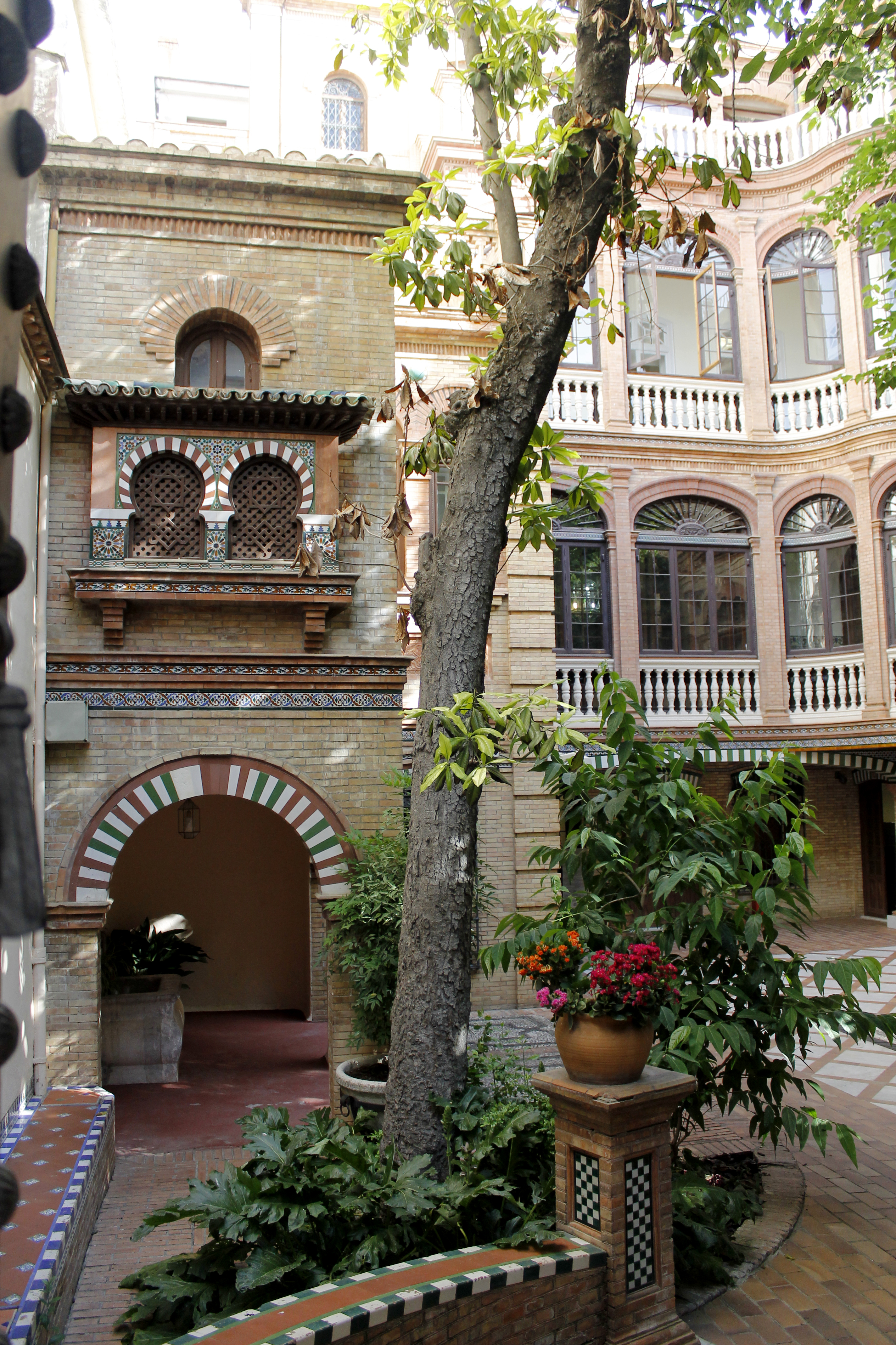 Interior del Palacio de los Condes de la Jarosa, Granada. España.